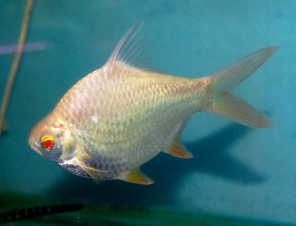 esemplare albino proveniente dall'Indonesia